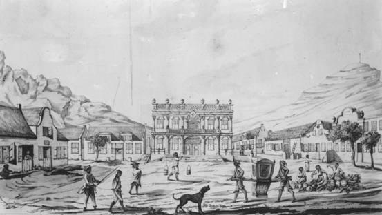 Johannes Rach. Oud Burgerwacht-huis in Kaapstad. 1764. Tekening. Verblijfplaats onbekend (Michaelis Collectie?). Afkomstig van